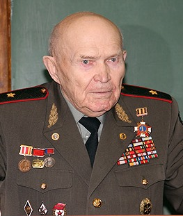 Анатолий Станиславович Круковский (род. 1922) — генерал-майор, заслуженный деятель науки Российской Федерации, почётный профессор Михайловской военной артиллерийской академии, доктор технических наук.